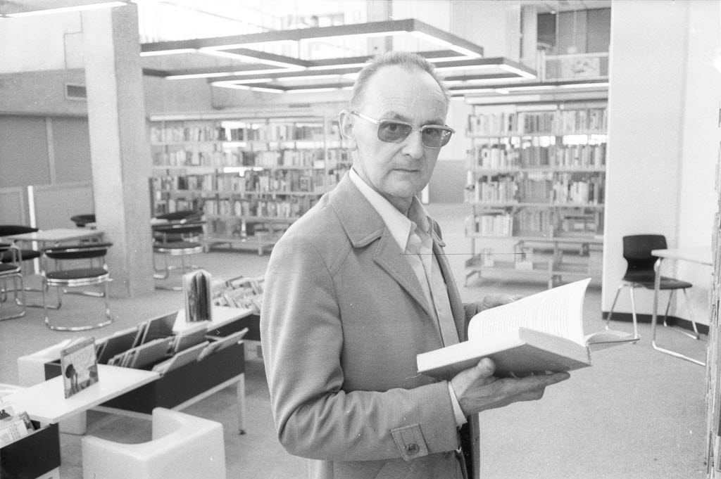 Anlässlich der Eröffnung der neuen Stadtteilbücherei Friedrichsort hat der bekannte Jugendbuchautor Boy Lornsen vor Schülern und Eltern in der Mensa in der Integrierten Gesamtschule Friedrichsort am Steenbarg 10 aus seinen Werken gelesen. Die neue Stadtteilbücherei ist in den Räumen der Gesamtschule untergebracht.